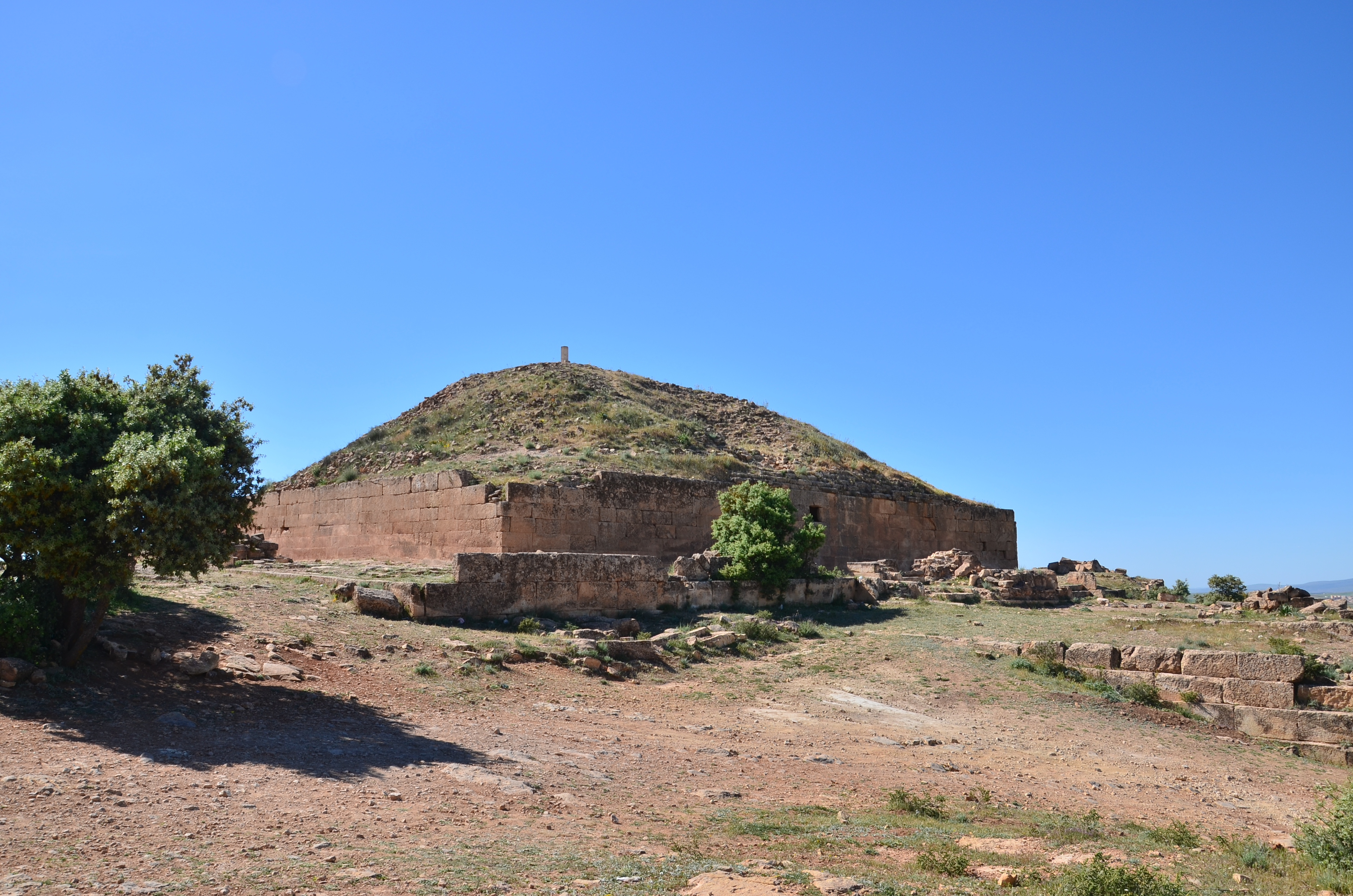 Djeddars Mon.Fun./Ant. (Frenda), monuments funéraires. À l'époque qui s'étend de 429 à 671, c'est-à-dire du départ des Romains jusqu'à l'invasion Arabe, il y avait, dans l'Ouest algérien, des roitelets à la tête de principautés. Tels seraient les rois berbères enterrés dans les Djeddars près de Frenda